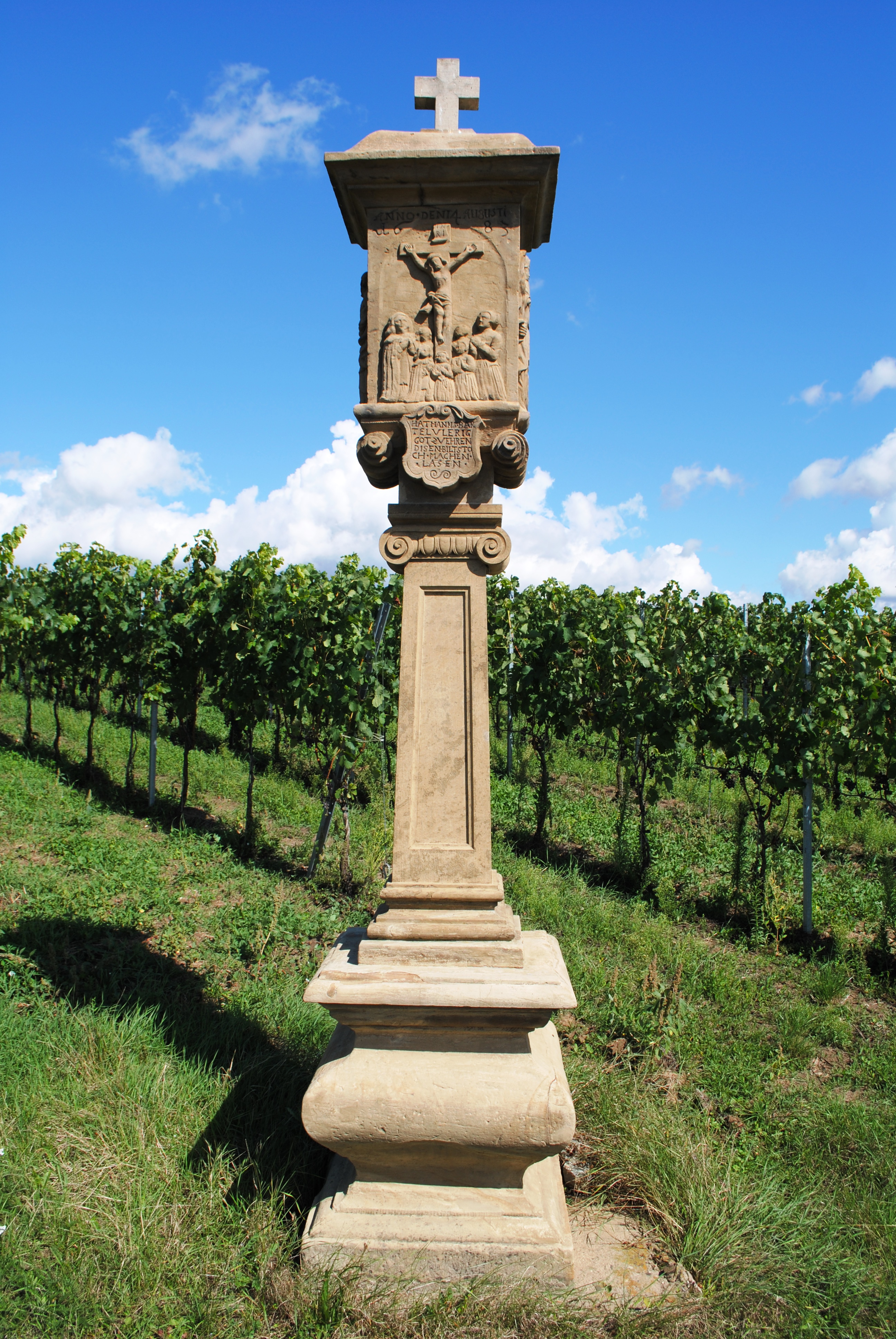 Bildstock, Holzweinberge, SommerachThis is a photograph of an architectural monument.